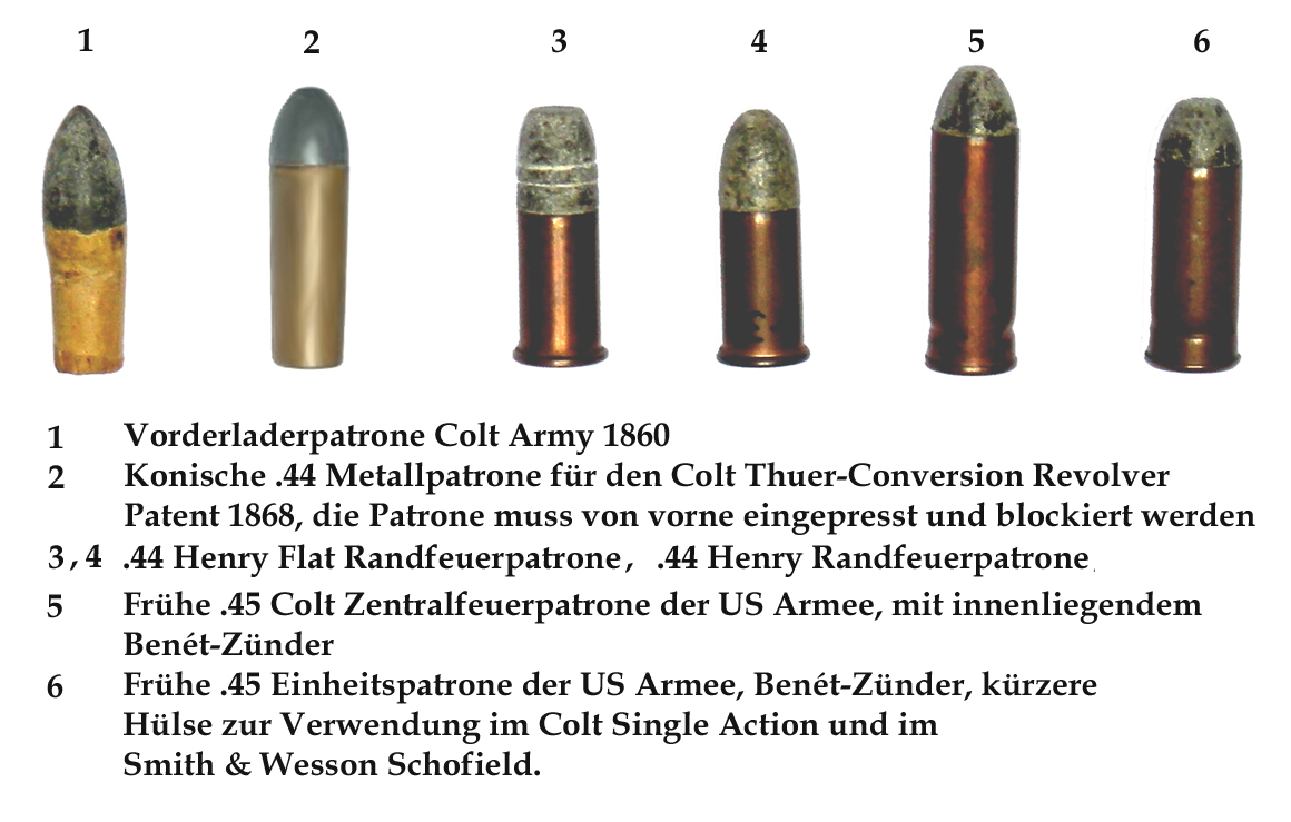 US Munition 1868 bis 1875